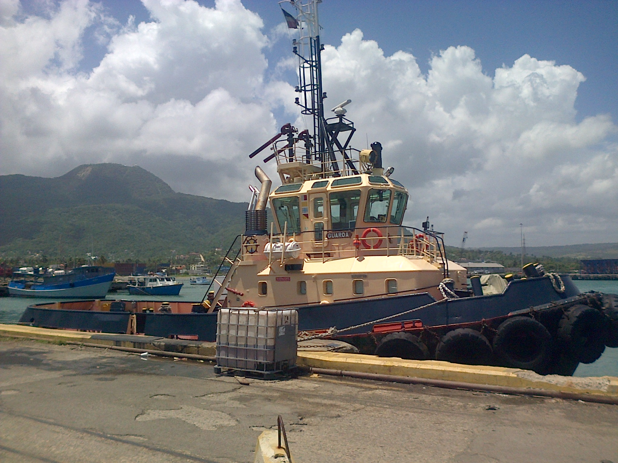 Remolcador Guaroa, Marina de Guerra Dominicana (RM-3) en el Muelle viejo de Puerto Plata, República Dominicana